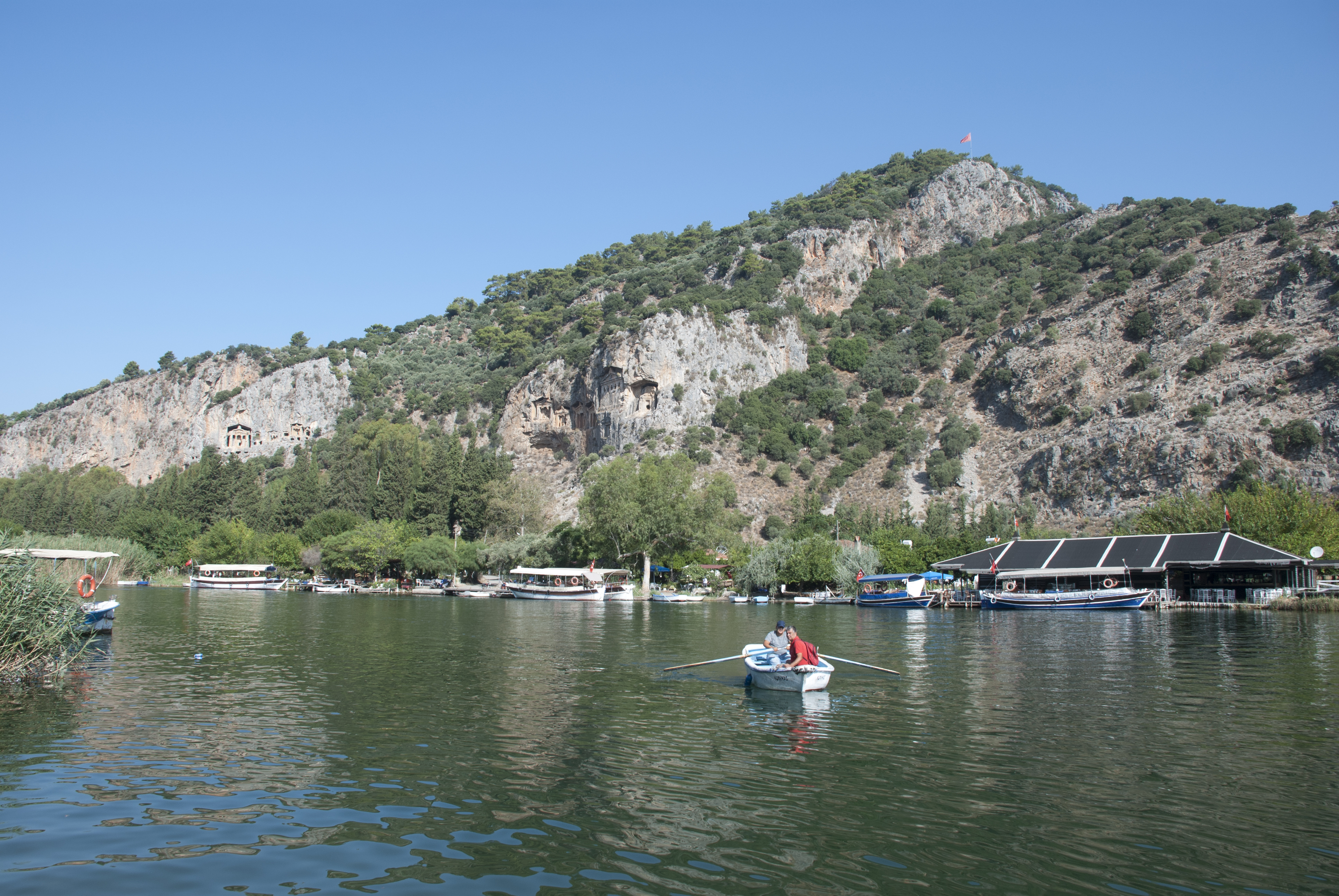 Muğla ili, Köycegiz Gölü çıkışı, Dalyan Kanalı